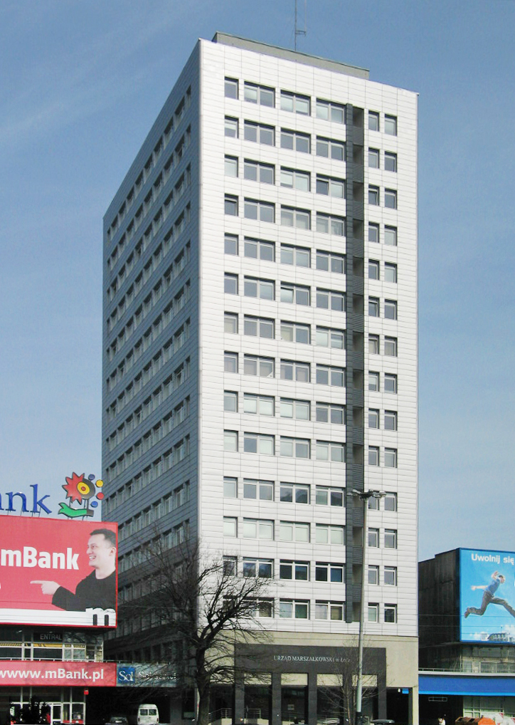 Urząd Marszałkowski w Łodzi